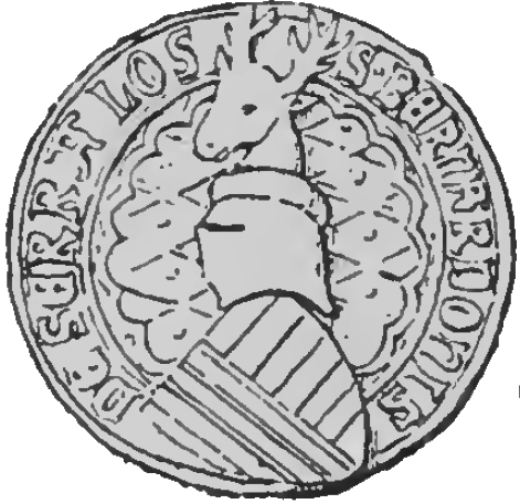 Sagèth de Bernardon de Sèrras